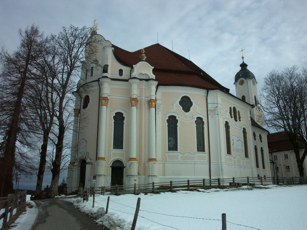 Wies church (Wieskirche), Germany